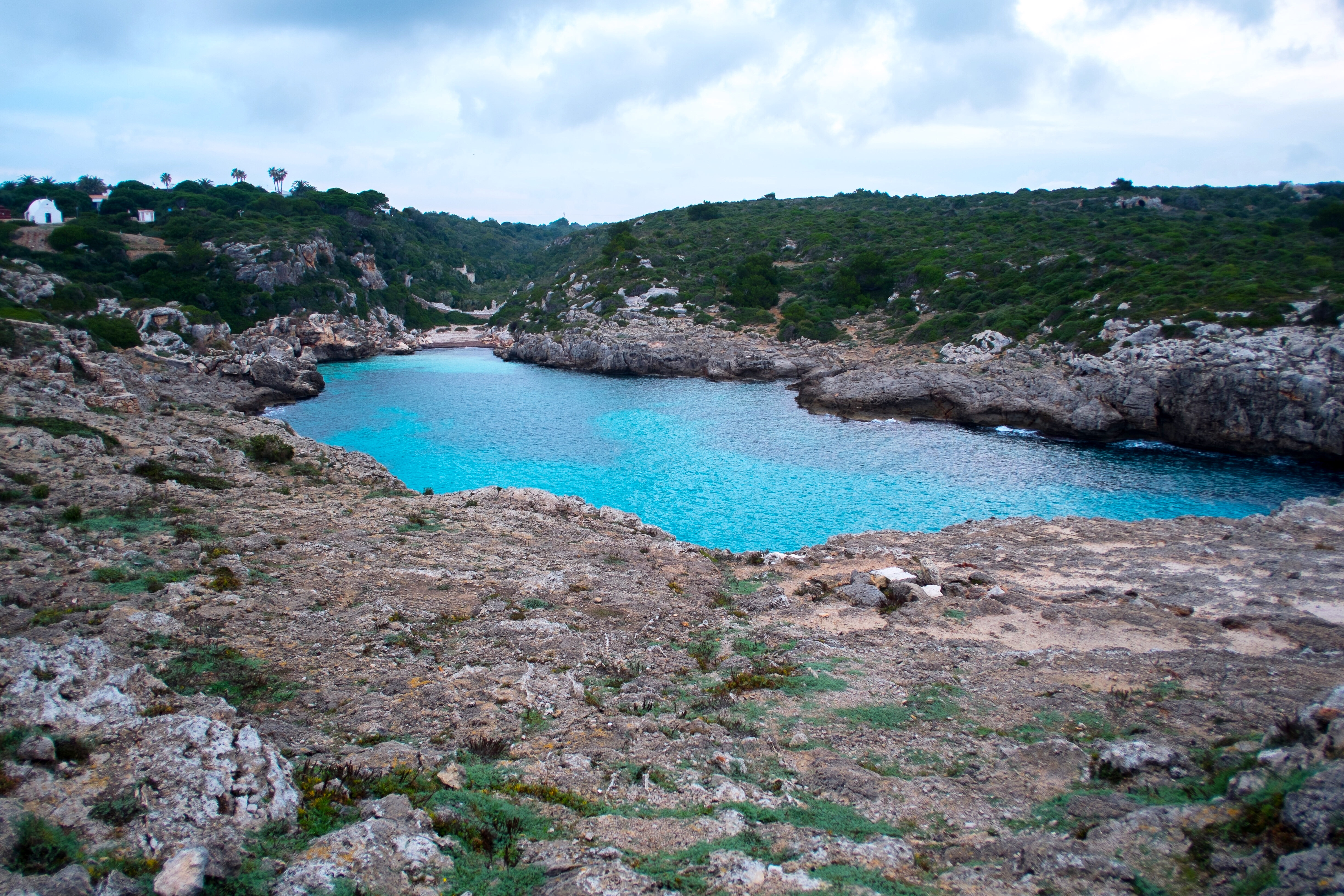 Vista de la Cala Binidalí